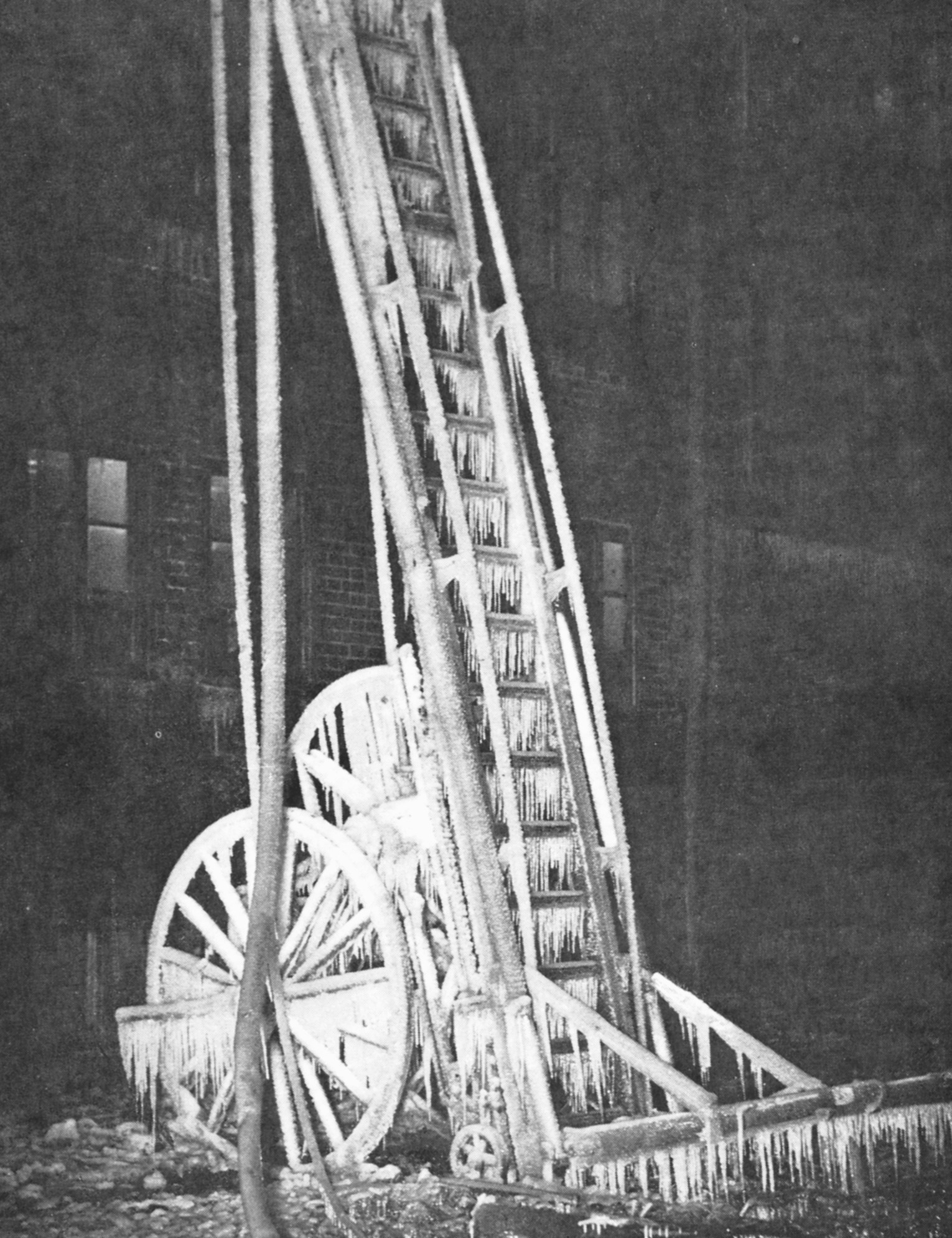 Branden på Mjölkcentralen i Stockholm, 1937, nedisad brandstege